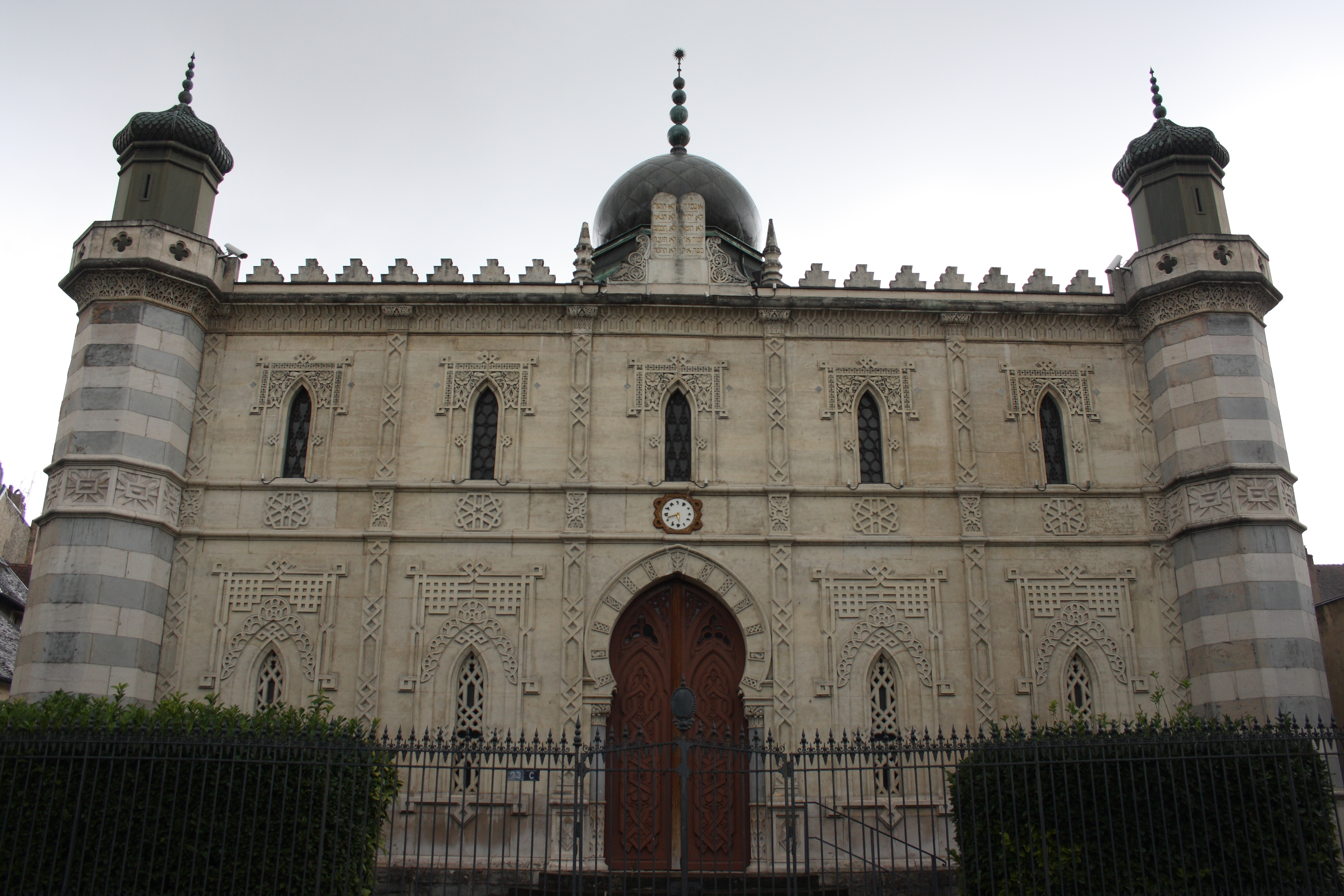 Synagoge in Besançon